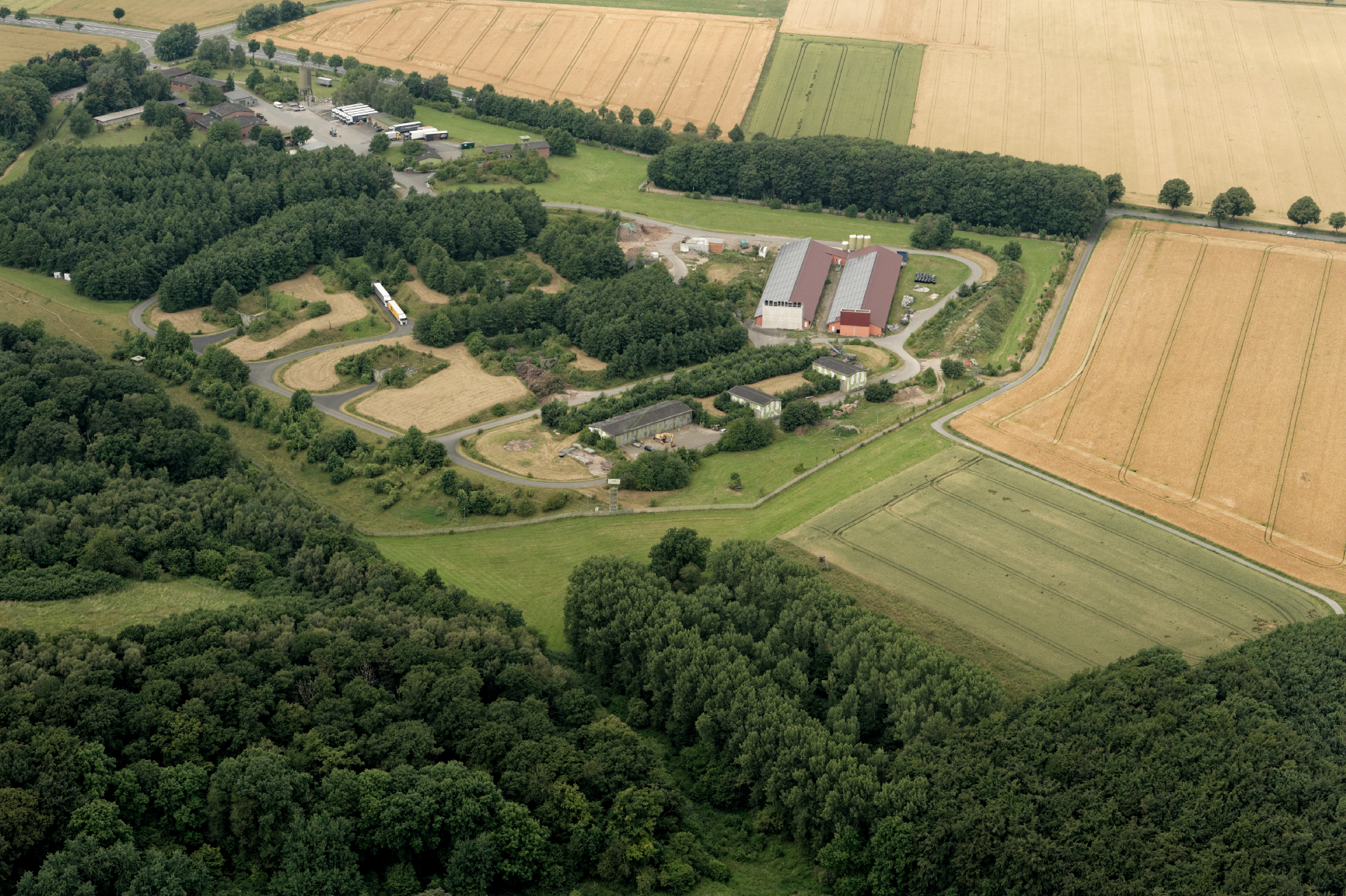 Zwischen Deiringsen und Büecke, an Kreuzung B 229 und K 32, ehemaliger Abschussbereich für Nike Hercules Raketen der Flugabwehrraketengruppe 21. Heute Nutzung verschiedener Art wie Polizeigelände und Viehstall. Fotoflug Sauerland Nord. The making of this document was supported by the Community-Budget of Wikimedia Germany.